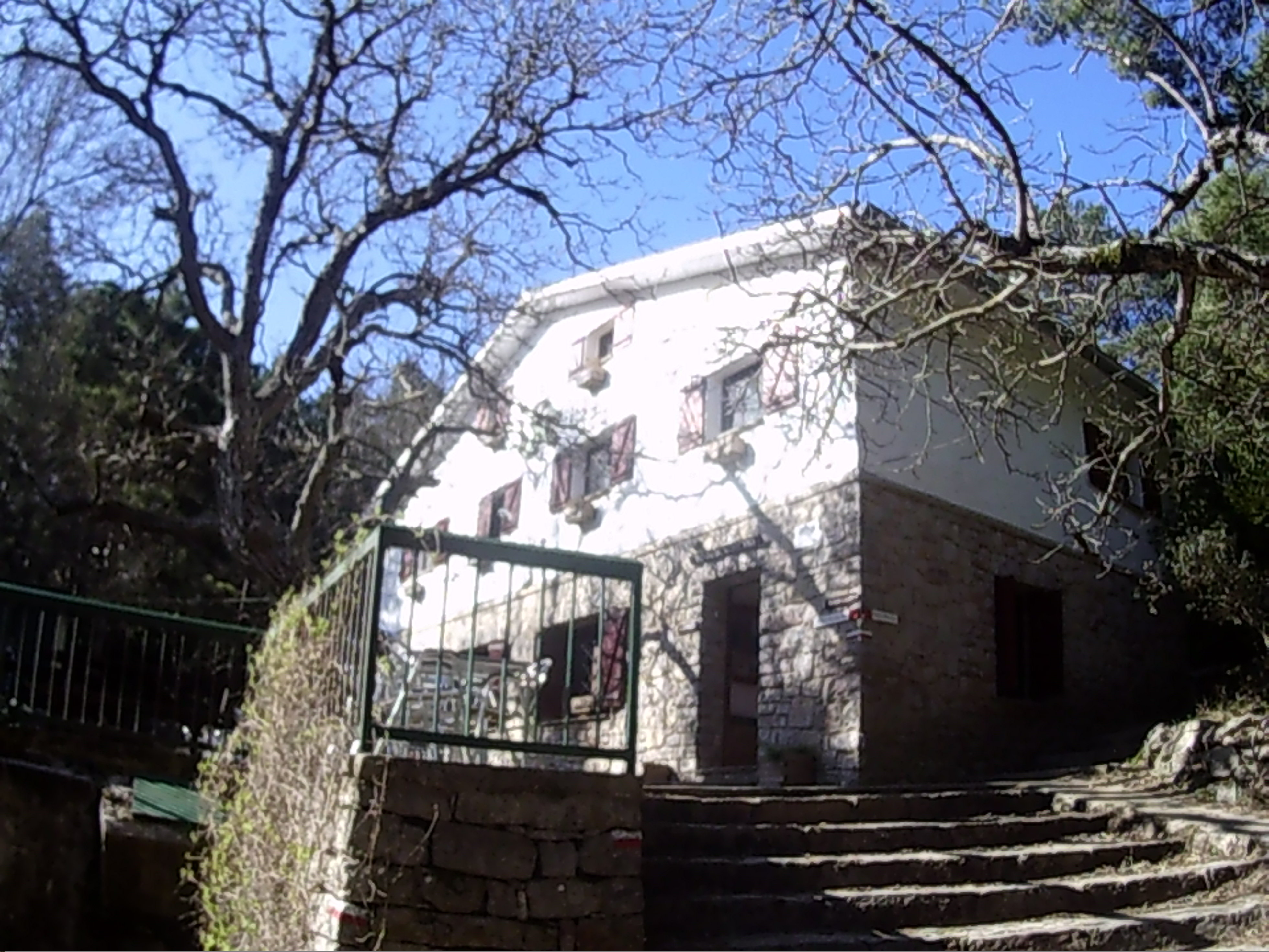 Refugi Caro UEC